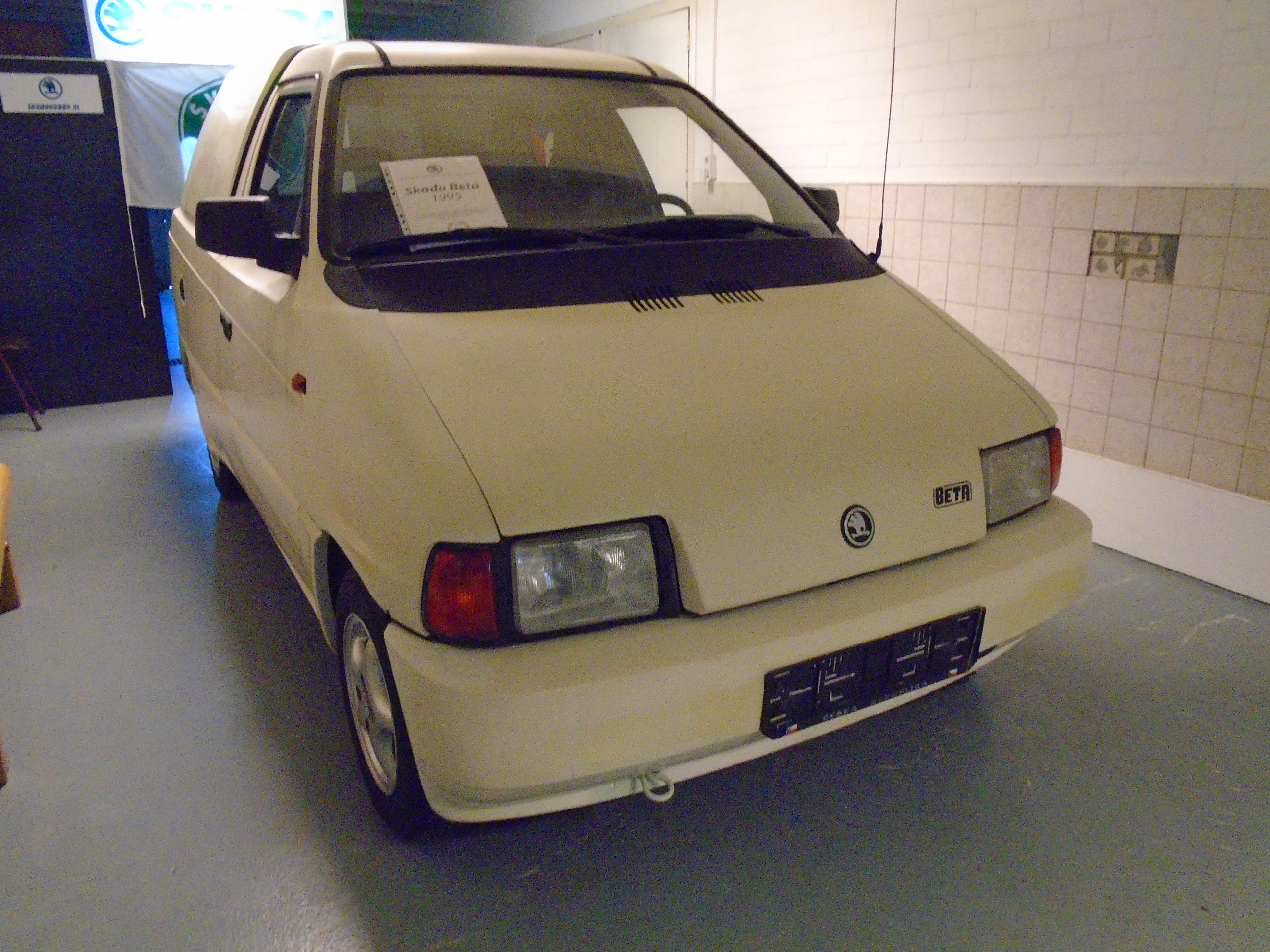 Škoda Beta 1995